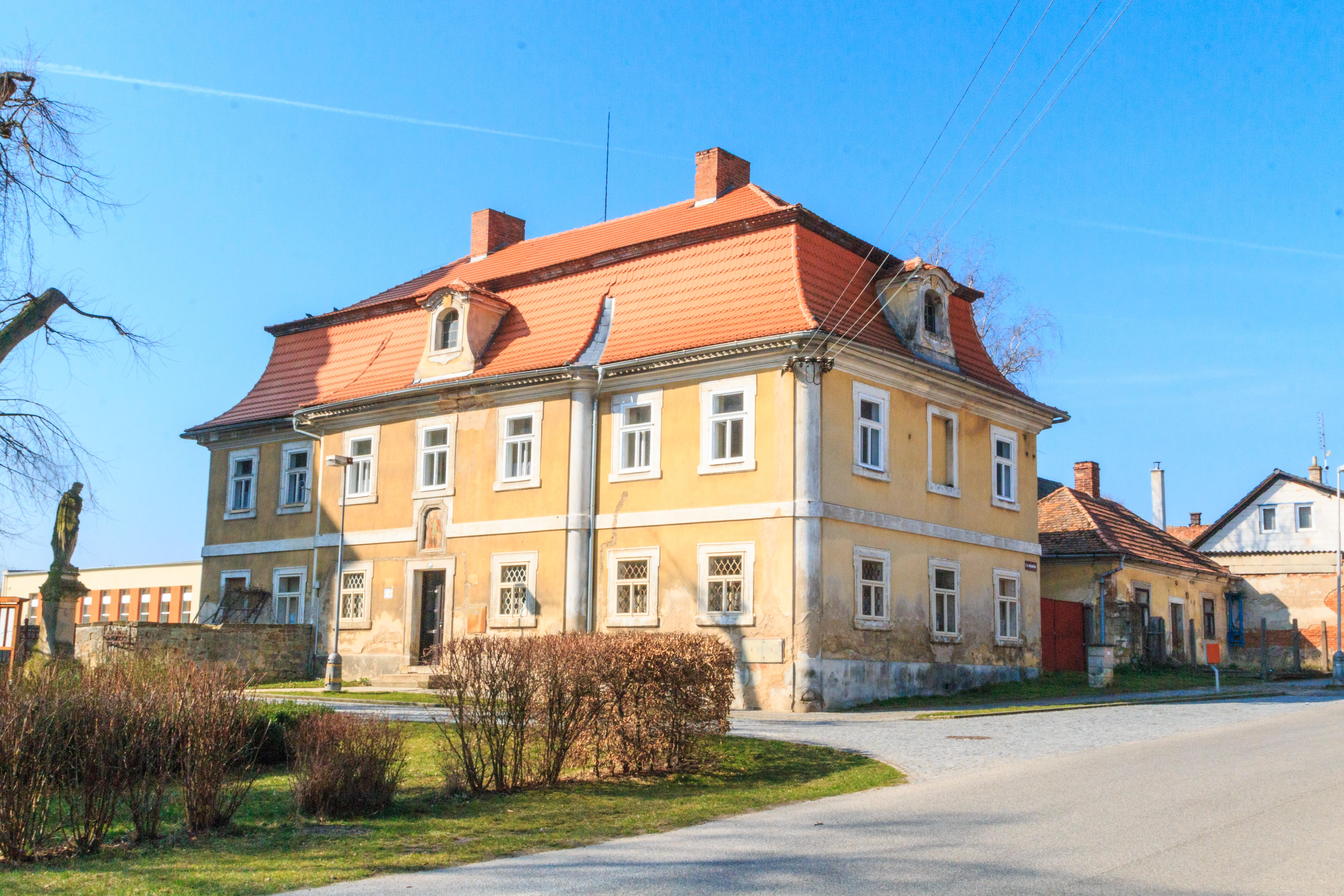 Fara, T. G. Masaryka 1, Libáň.